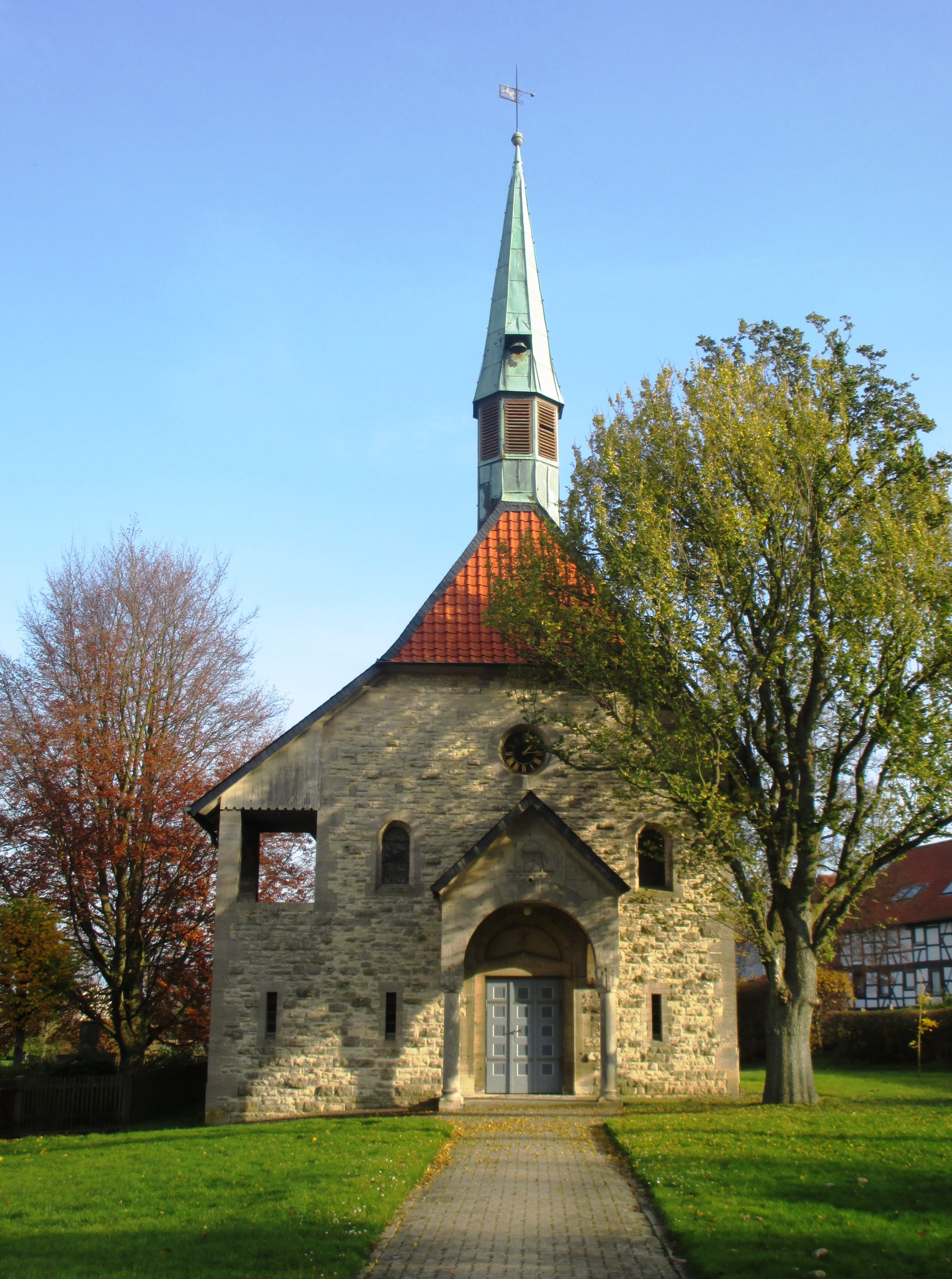 St.-Jakobi-Kapelle in Hohenassel, Gemeinde Burgdorf, Landkreis Wolfenbüttel